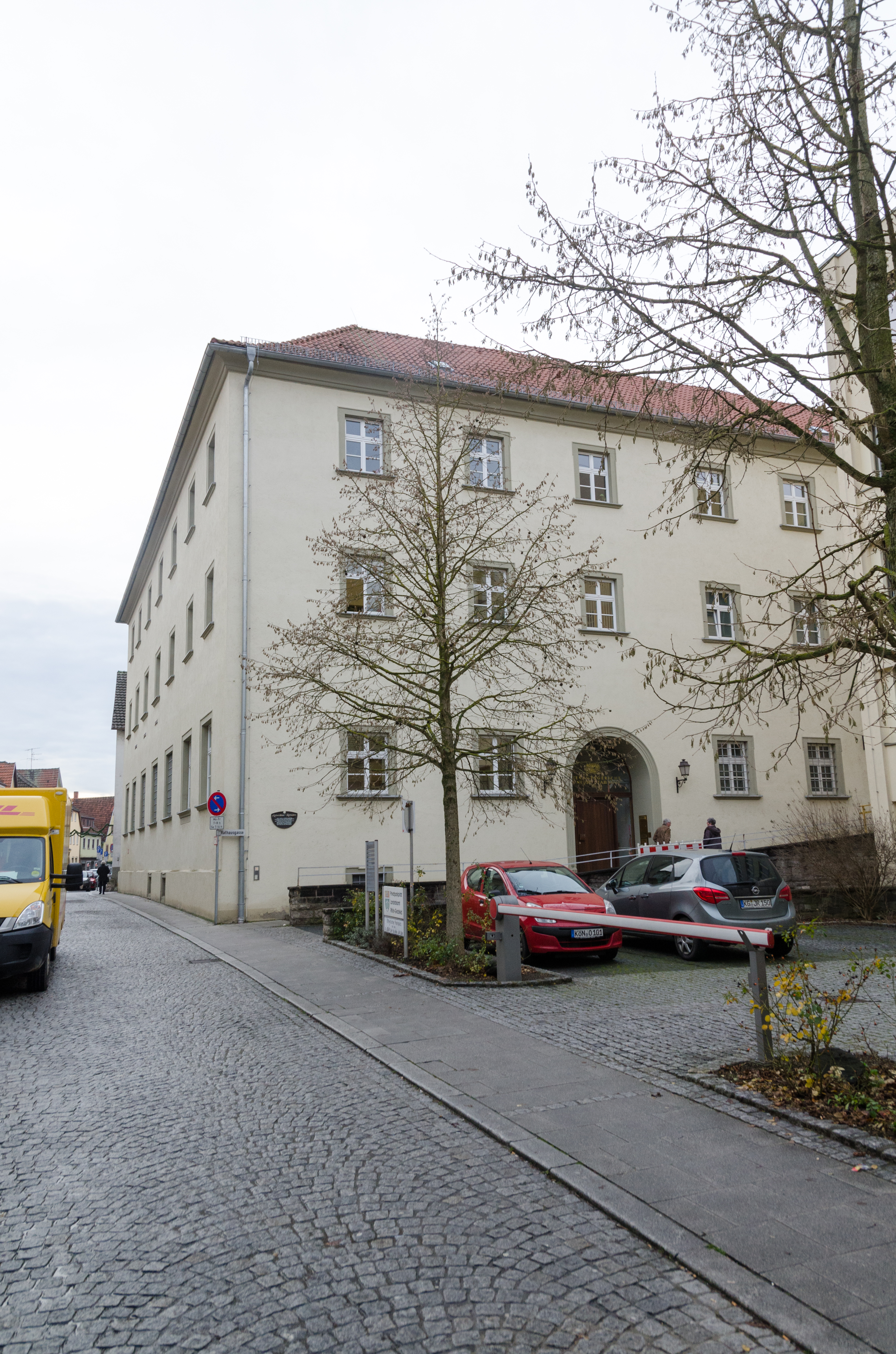 Bad Neustadt an der Saale, Rathausgasse 4, Amtsgericht